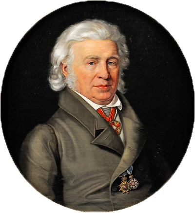 Gemälde des Samuel Thomas von Soemmerring.